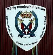 Wappen der KMILE Eupen am König Baudouin-Stadion auf Schönefeld